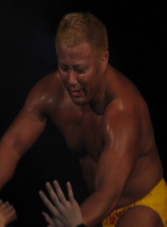 2011年11月12日 大阪府立体育会館 「POWER STRUGGLE」 本間朋晃